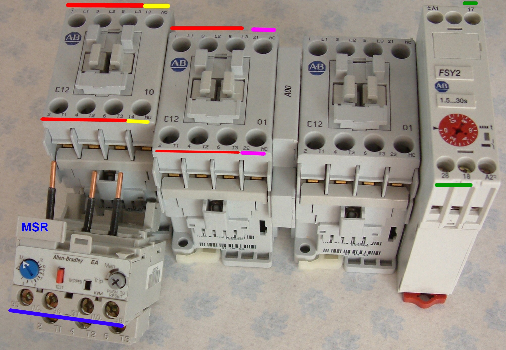 Schützen für Stern - Dreieck MOTORSTARTER mit mechanischer Verriegelung (A00) Motorschutzrelais (unten links) und Zeitrelais (ganz rechts) die Klemmennummern sind gut sichtbar.